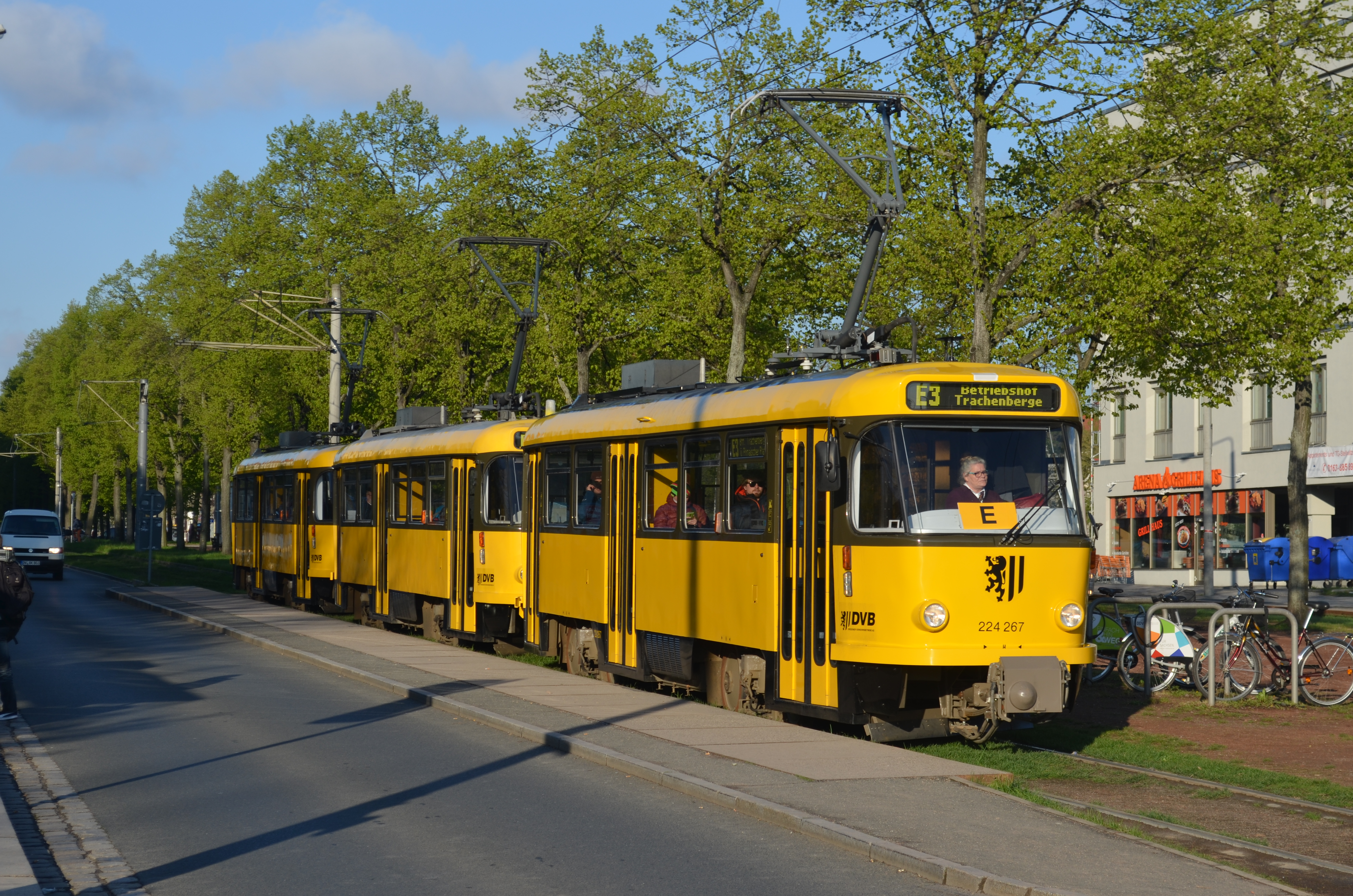 Dresdner Tatra als Verstärkung für den Transport Dresdner Studenten auf der Linie E3 am Nürnberger Platz